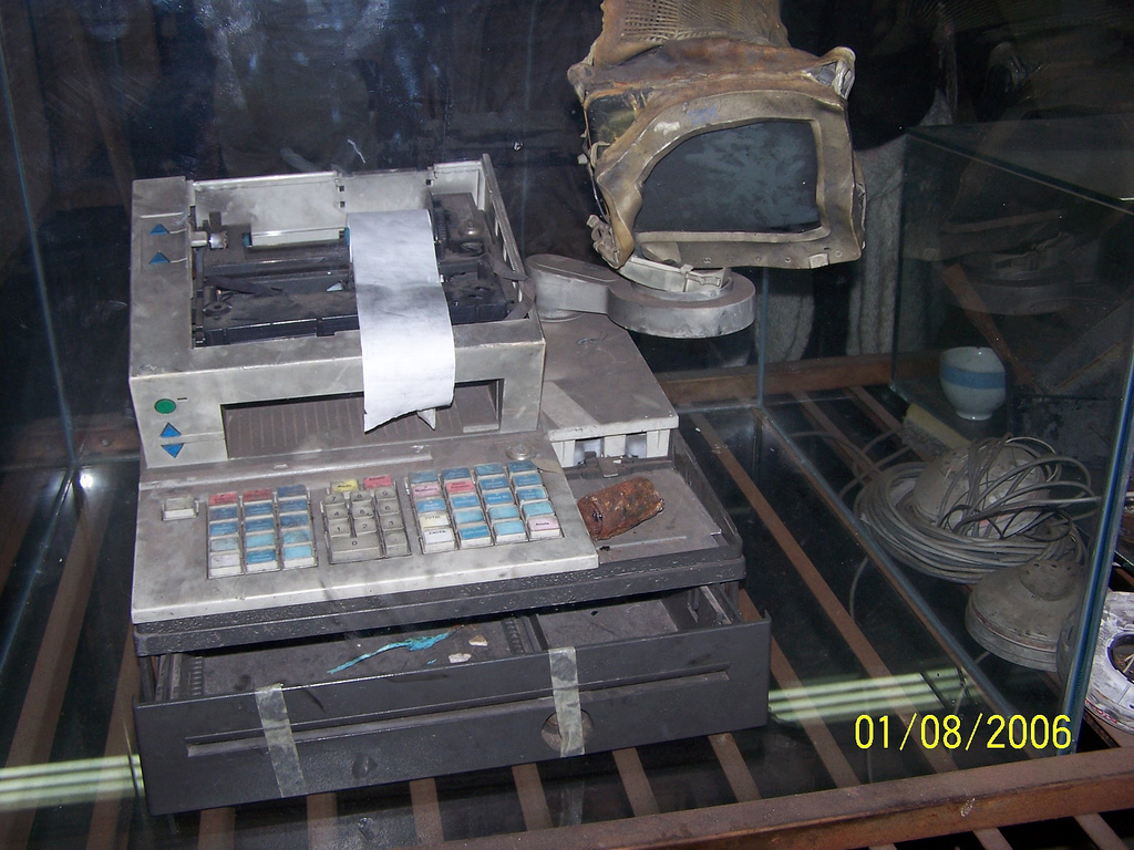 Una de las cajas registradoras del supermercado Ycuá Bolaños "Botánico" afectadas por el incendio del 01 de agosto de 2004, se puede observar el monitor casi derretido, esto se puede apreciar en el mini museo y santuario de victimas ubicado en el predio del siniestrado supermercado entre las Avenidas General Artígas c/ Santísima Trinidad del barrio Trinidad en la ciudad de Asunción, Paraguay.